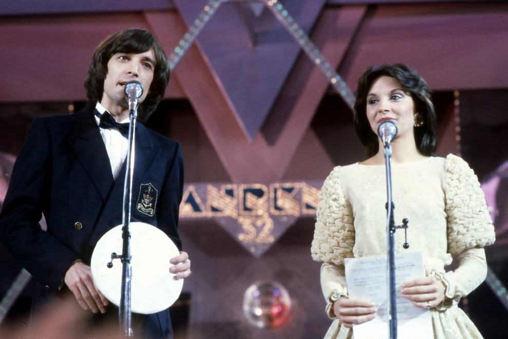 I conduttori del Festival di Sanremo 1982, Patrizia Rossetti e Claudio Cecchetto